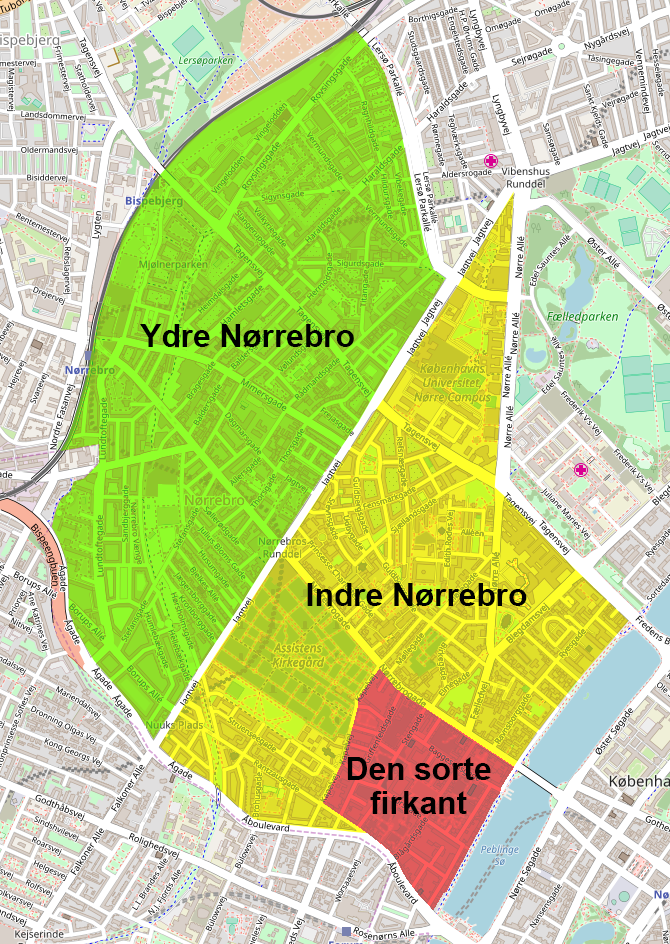 Placering af området Den sorte firkant på Nørrebro i København. Gult, rødt og grønt område udgør tilsammen hele Nørrebro. Grønt område udgør Ydre Nørrebro. Gult og rødt område udgør tilsammen Indre Nørrebro.